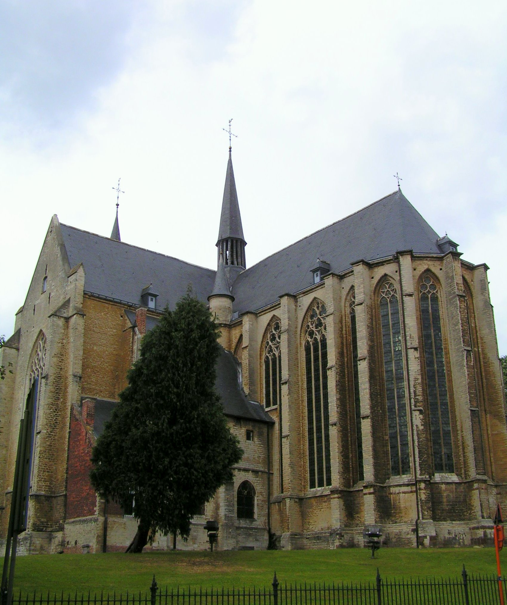 St. Kwinten (Quentin), Leuven, Belgium